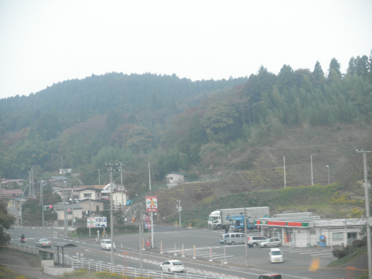 宮城県宮城郡利府町赤沼大日向 宮城県道8号仙台松島線